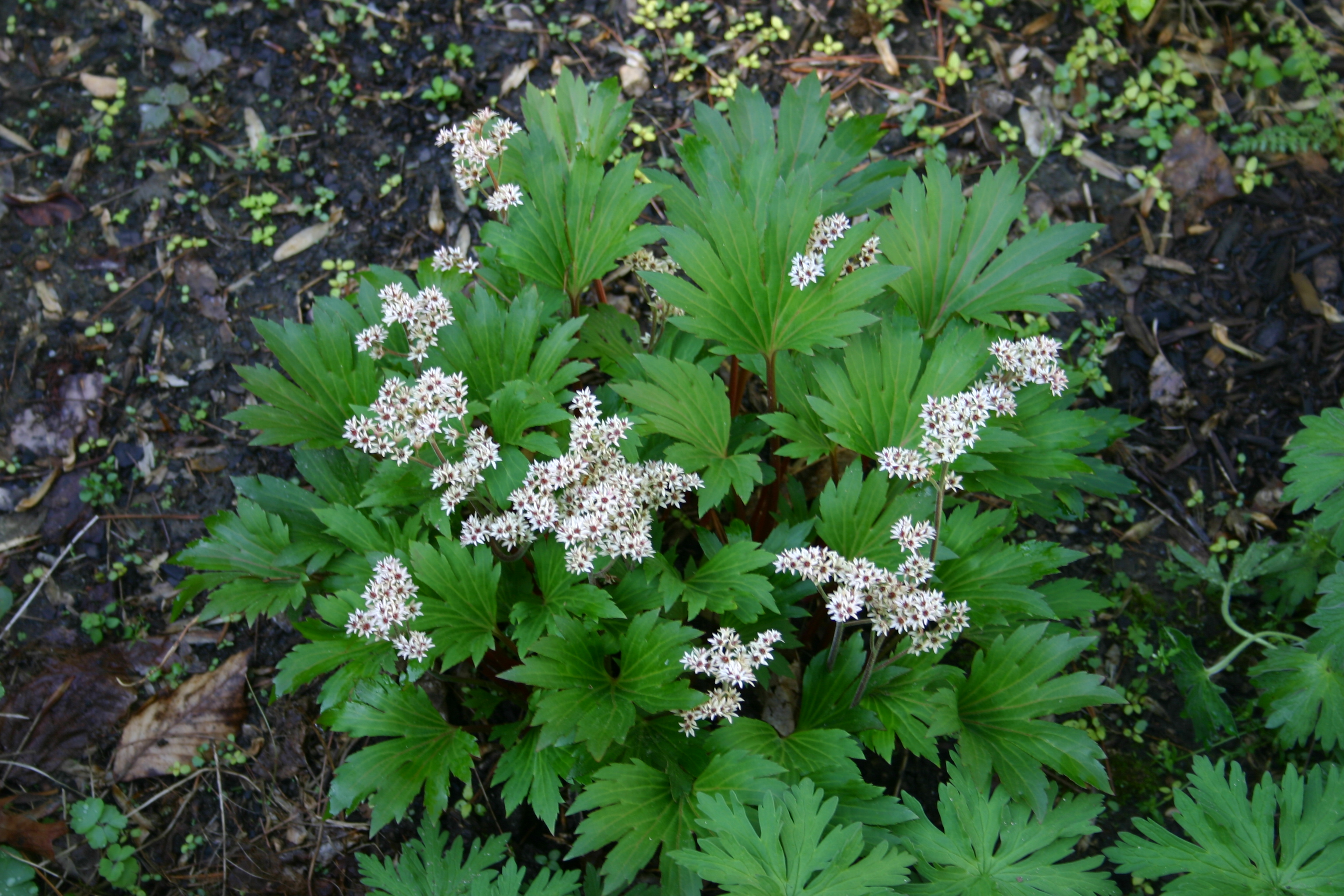 Mukdenia rossii